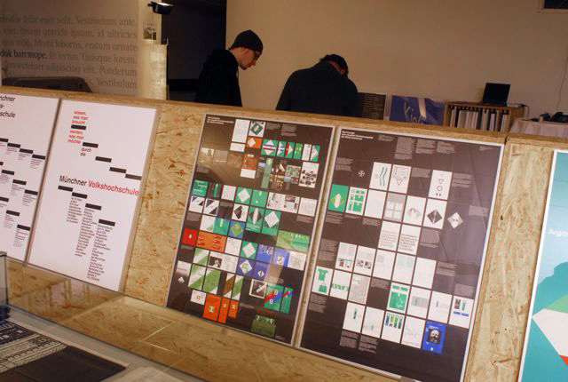 Vorbereitung der Retrospektive: „Rolf Müller – Zeichensetzer, Systemdenker, Geschichtenerzähler“ am 10.02.2009 in der Halle 27 (Kochan & Partner) Hirschgartenallee 27, 80639 München. Anlässlich der Verleihung des Designpreises der Stadt München organisierte die Typografische Gesellschaft München die erste Retrospektive zum Werk Rolf Müllers. Im Vordergrund: Erscheinungsbild der Stadt Leverkusen